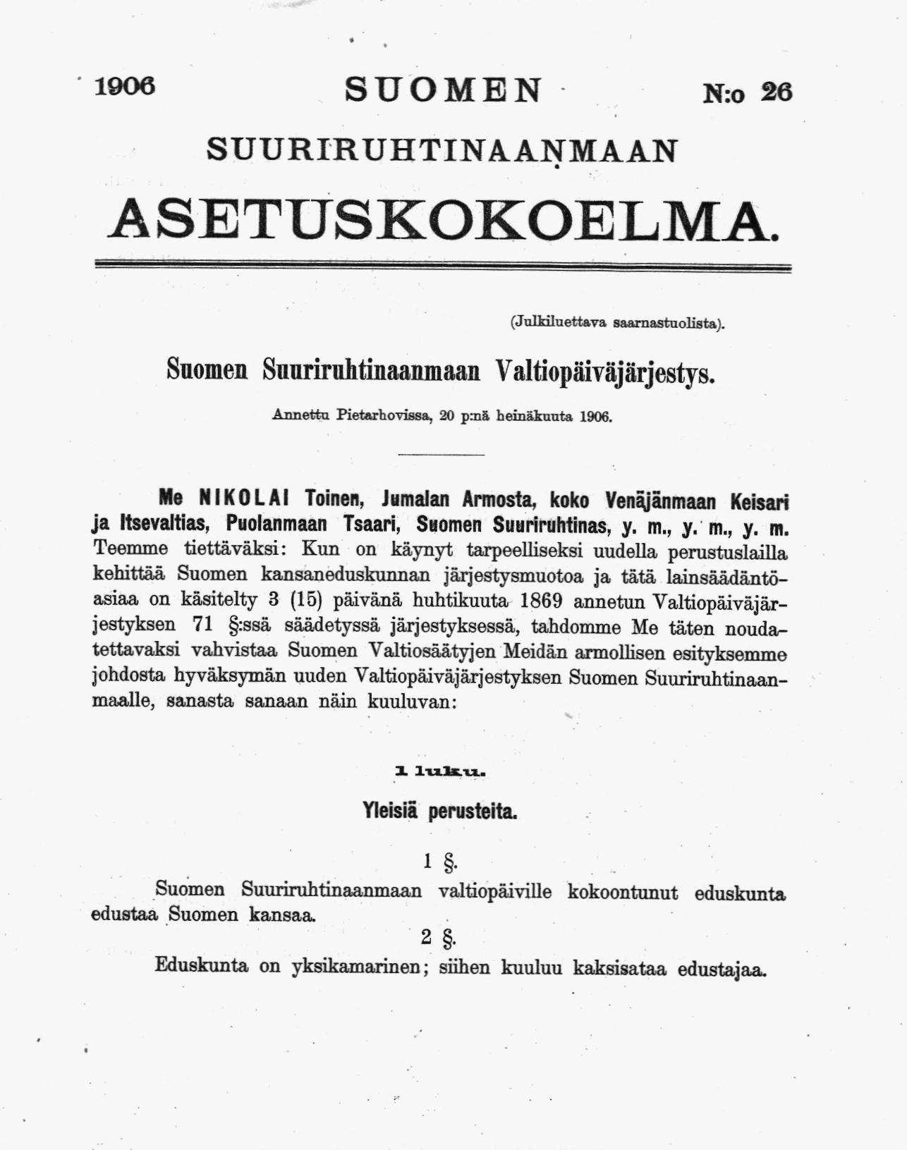 Ensimmäinen sivu: Suomen Suuriruhtinaanmaan Valtiopäiväjärjestys (AsK 26/1906).